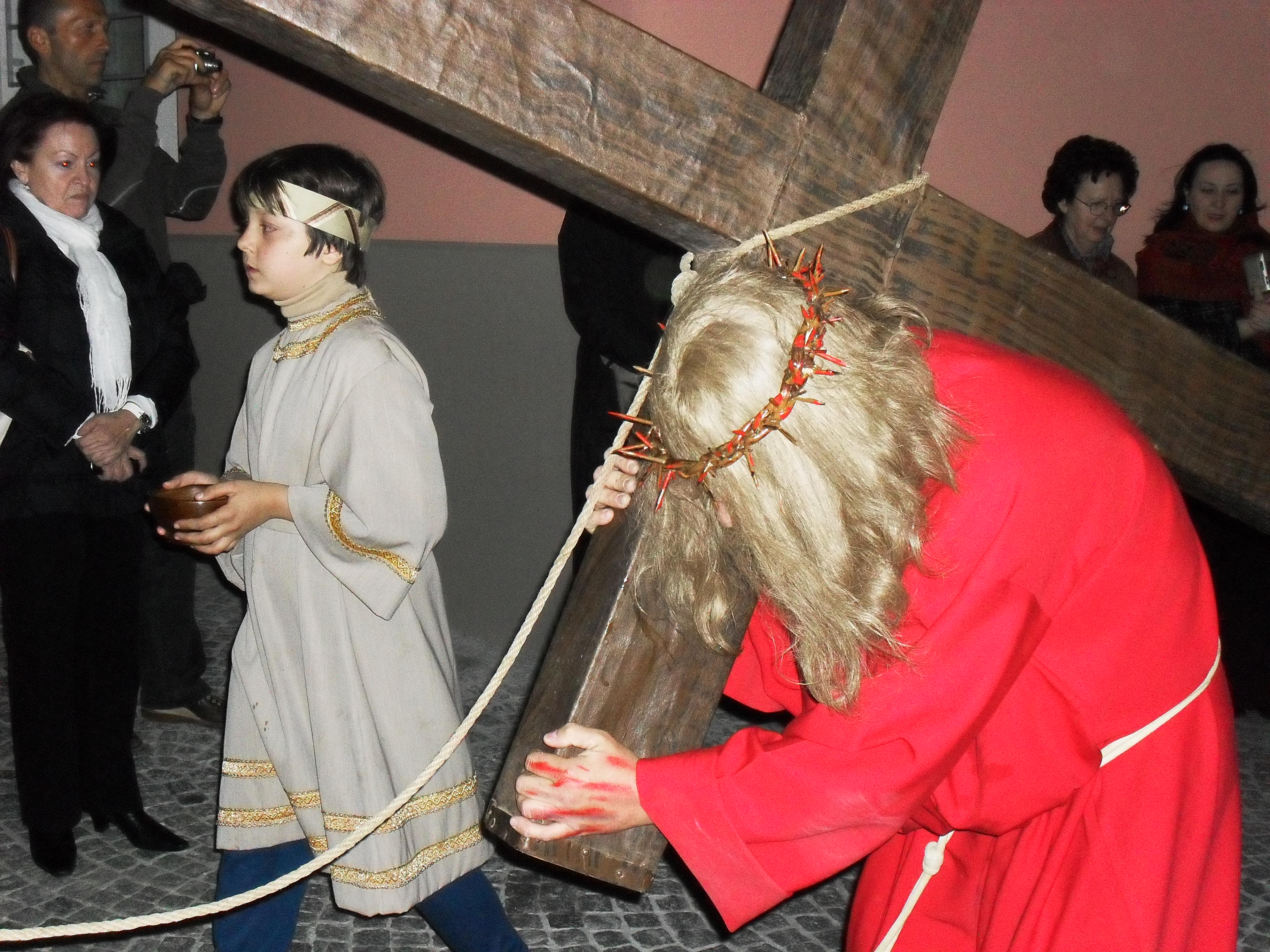 Processioni storiche di Mendrisio: Gesù